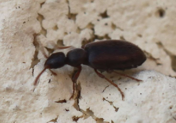 Anthicus cf. flavipes am 15. April 2019 südlich von Mannheim